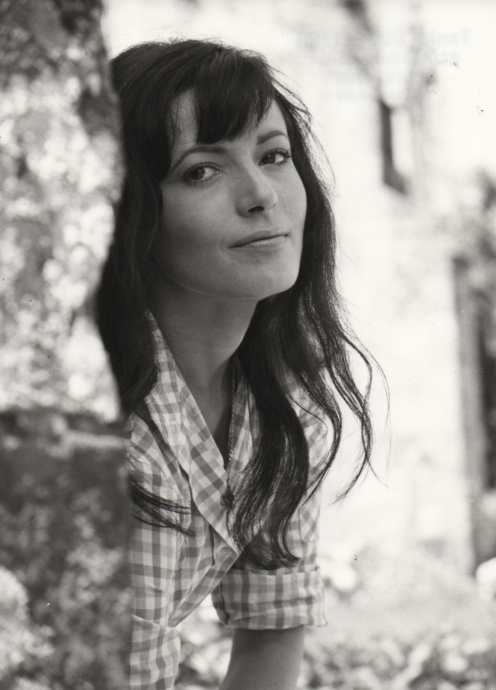 Photographie prise en 1974 pendant le tournage de "la merveilleuse visite" de Marcel Carné.